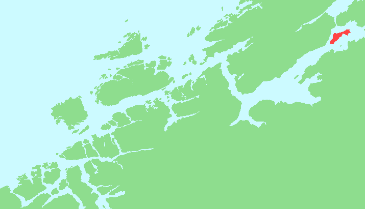 Locator map of Ytterøya, Nord-Trøndelag, Norway